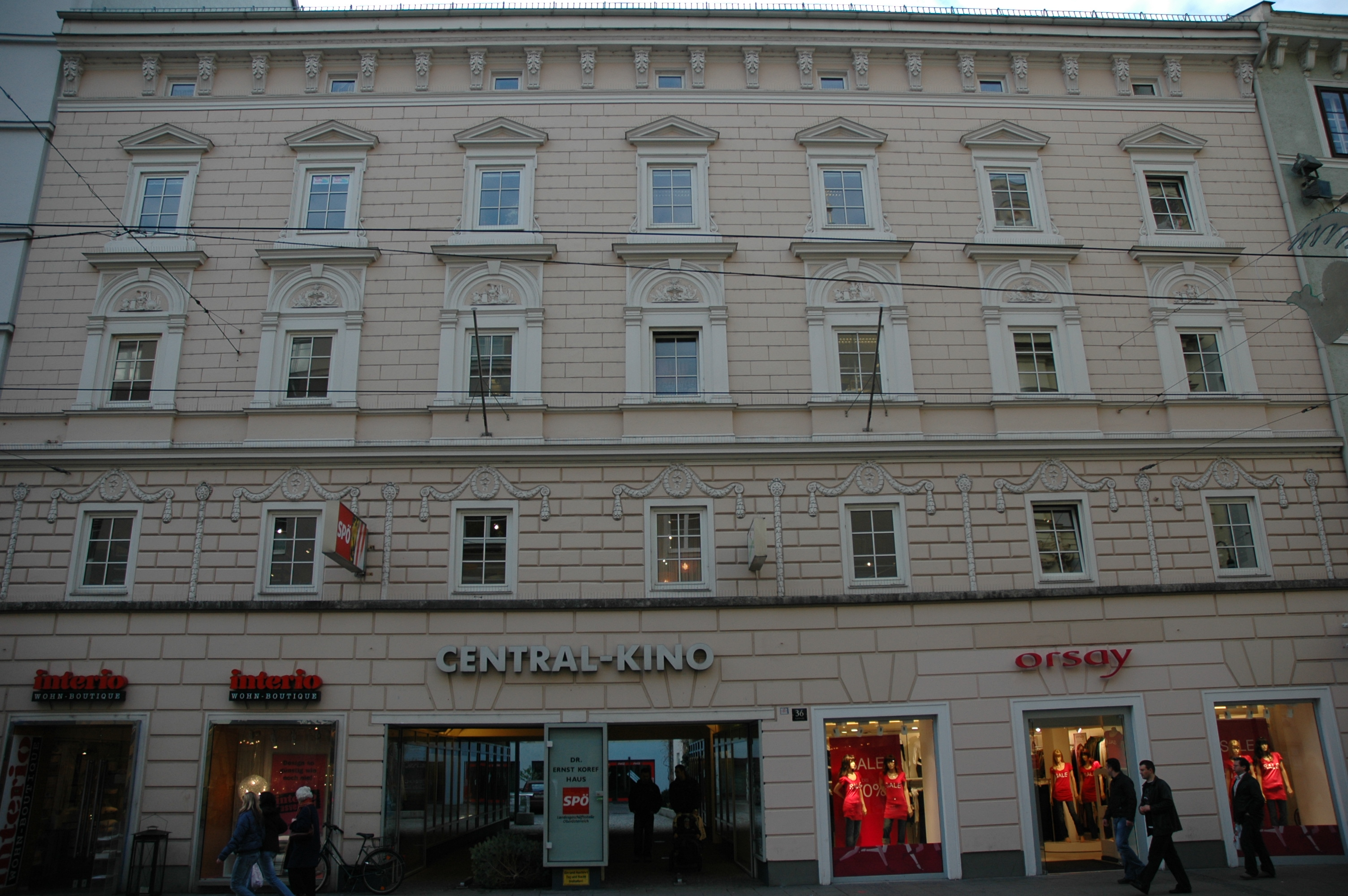 Fassade des Hotels Schiff - heute SPÖ-Parteizentrale und Kino-Standort - an der Landstraße in der Linzer Innenstadt.